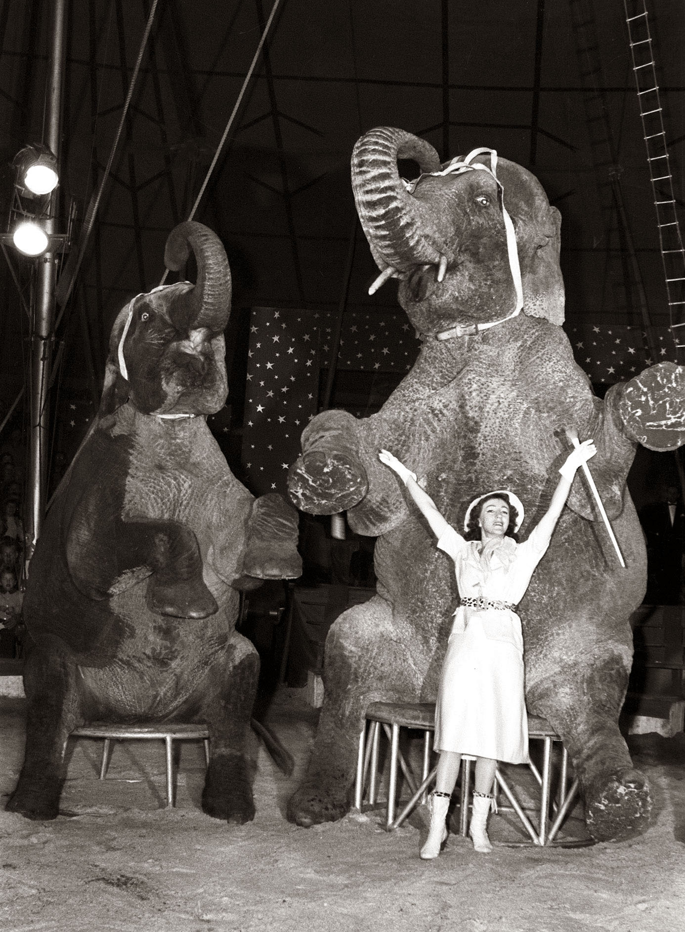 Avstrijski cirkus Medrano v Mariboru